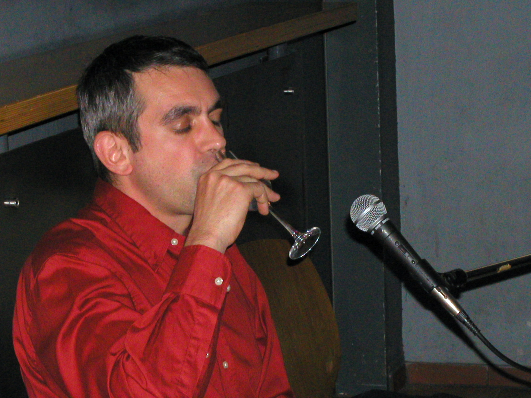 Bildbeschreibung: Wladimir Kaminer beim Verkosten des berühmten Quittenschnapses (siehe "Mein deutsches Dschungelbuch") im Club W71, Weikersheim Fotograf/Zeichner: Schorle Datum: 14.5.2005 Sonstiges: ...